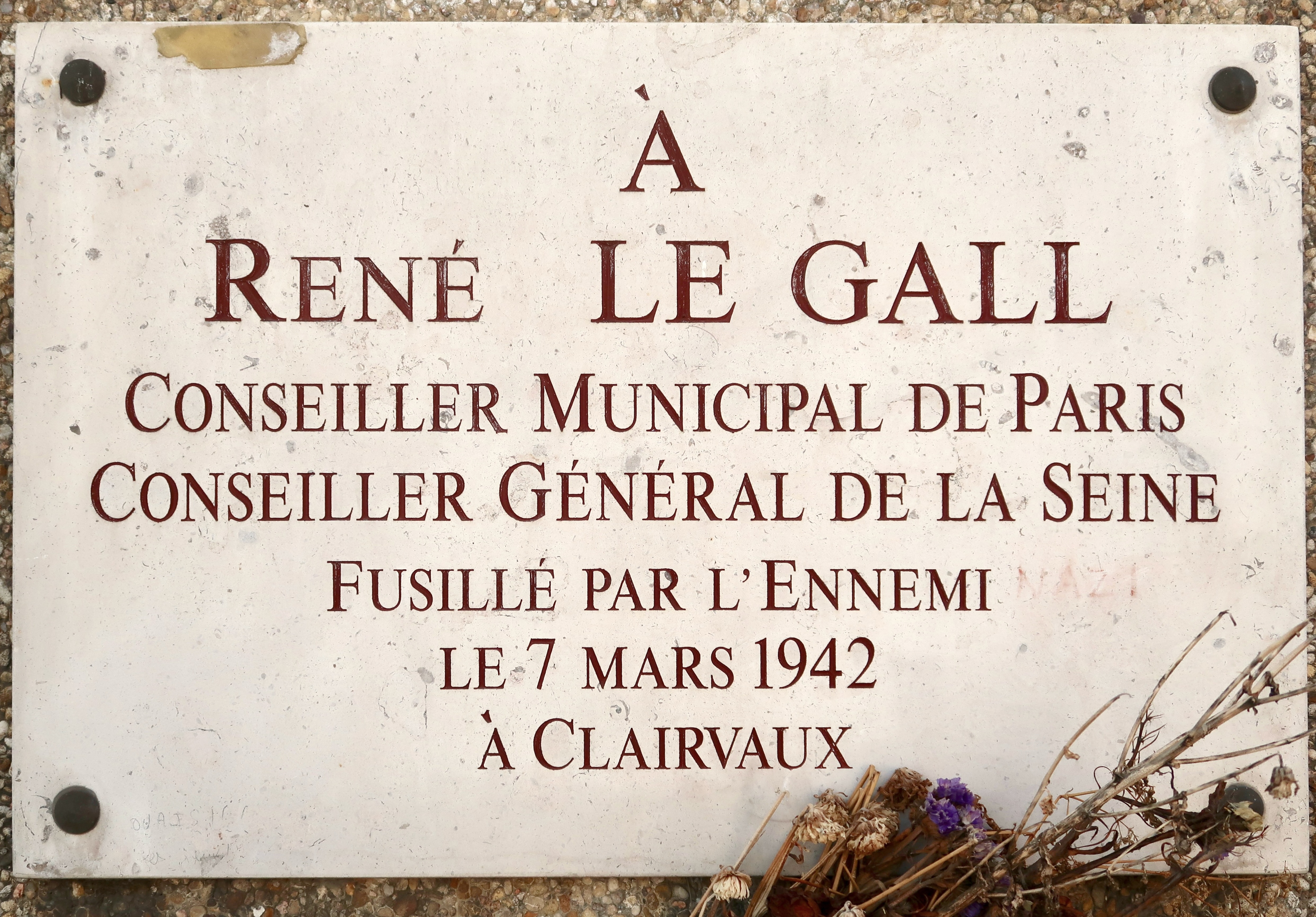 Plaque en hommage à René Le Gall, devant le square René-Le-Gall, côté rue Berbier-du-Mets (Paris, 13e).